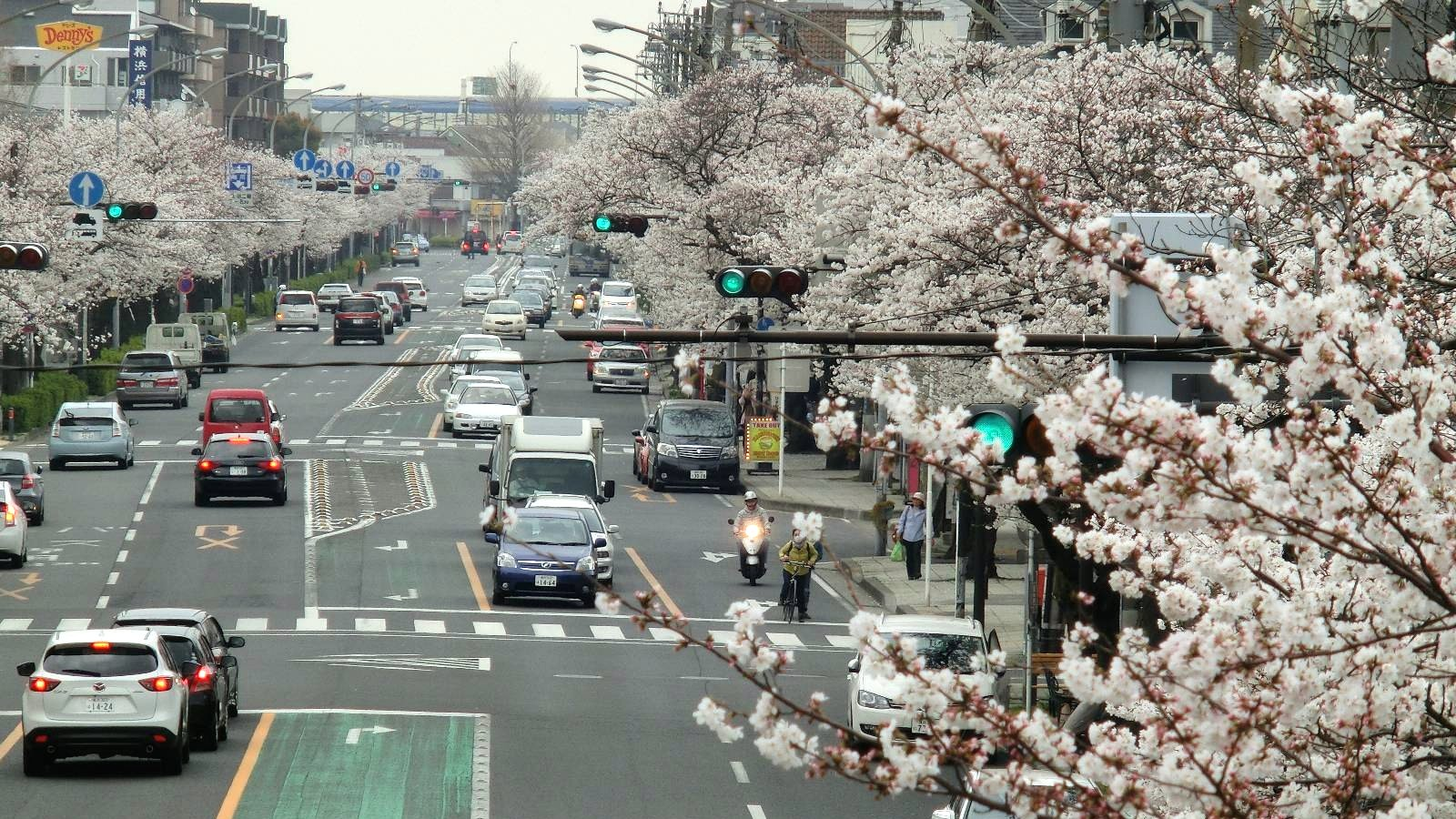 間門から本牧のソメイヨシノ満開